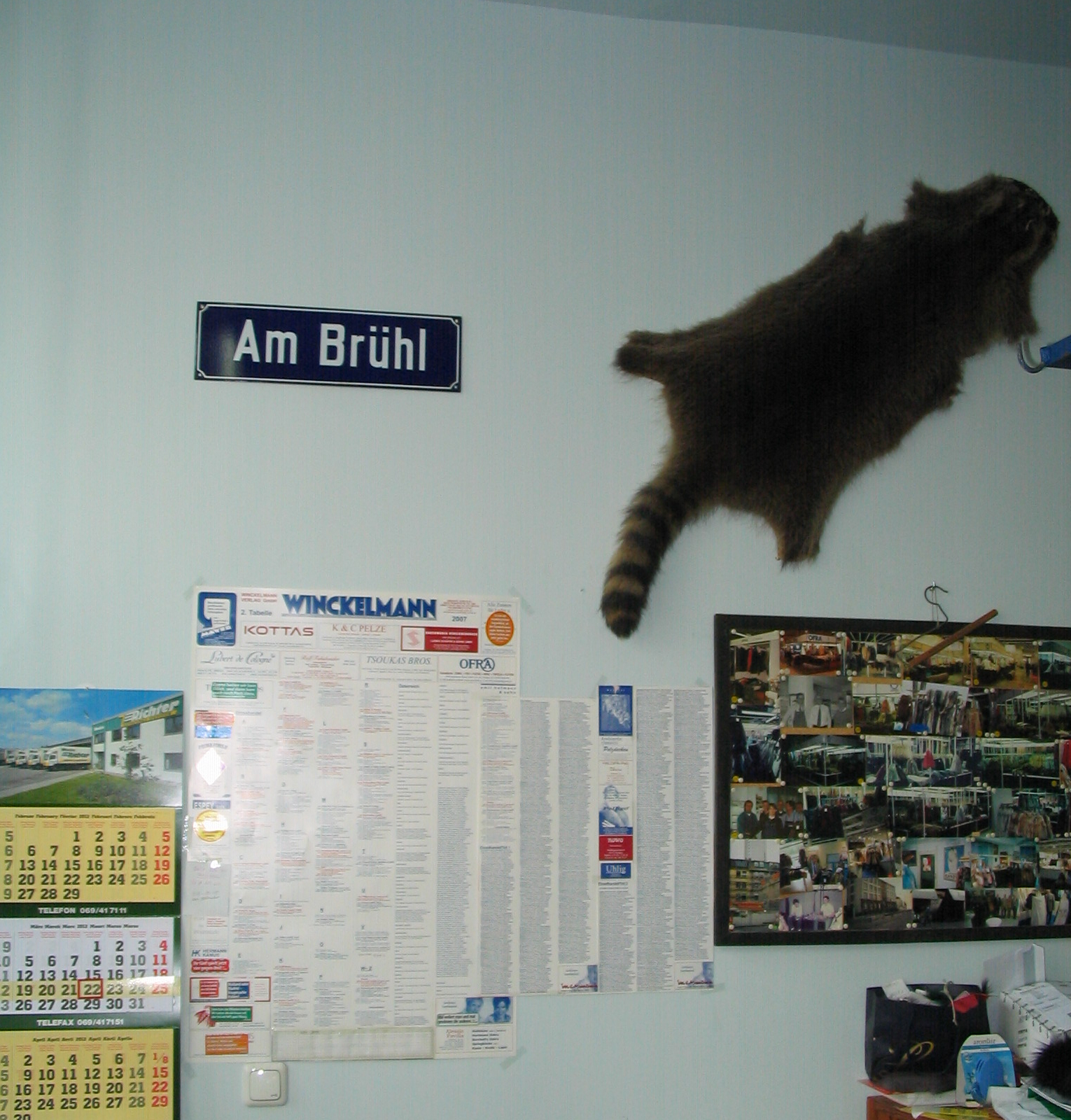 Am Lager eines Frankfurter Rauchwarenhändlers auf der Niddastraße. Die Niddastraße, in der Pelzbranche genannt „Der Brühl“, nach dem ehemaligen Rauchwaren-Handelszentrum um die Straße „Brühl“ in Leipzig. Die jährlich veröffentlichte, kostenlos versandte Winckelmann-Wandtabelle mit den Adressen und Telefonnummern der deutschen Pelzhändler hing, bereits in den 1920er Jahren bis zu ihrer Einstellung nach dem Tod des letzten Herausgebers der Familie, bei jedem Händler und in den Büros oder Werkstätten der meisten Kürschner.